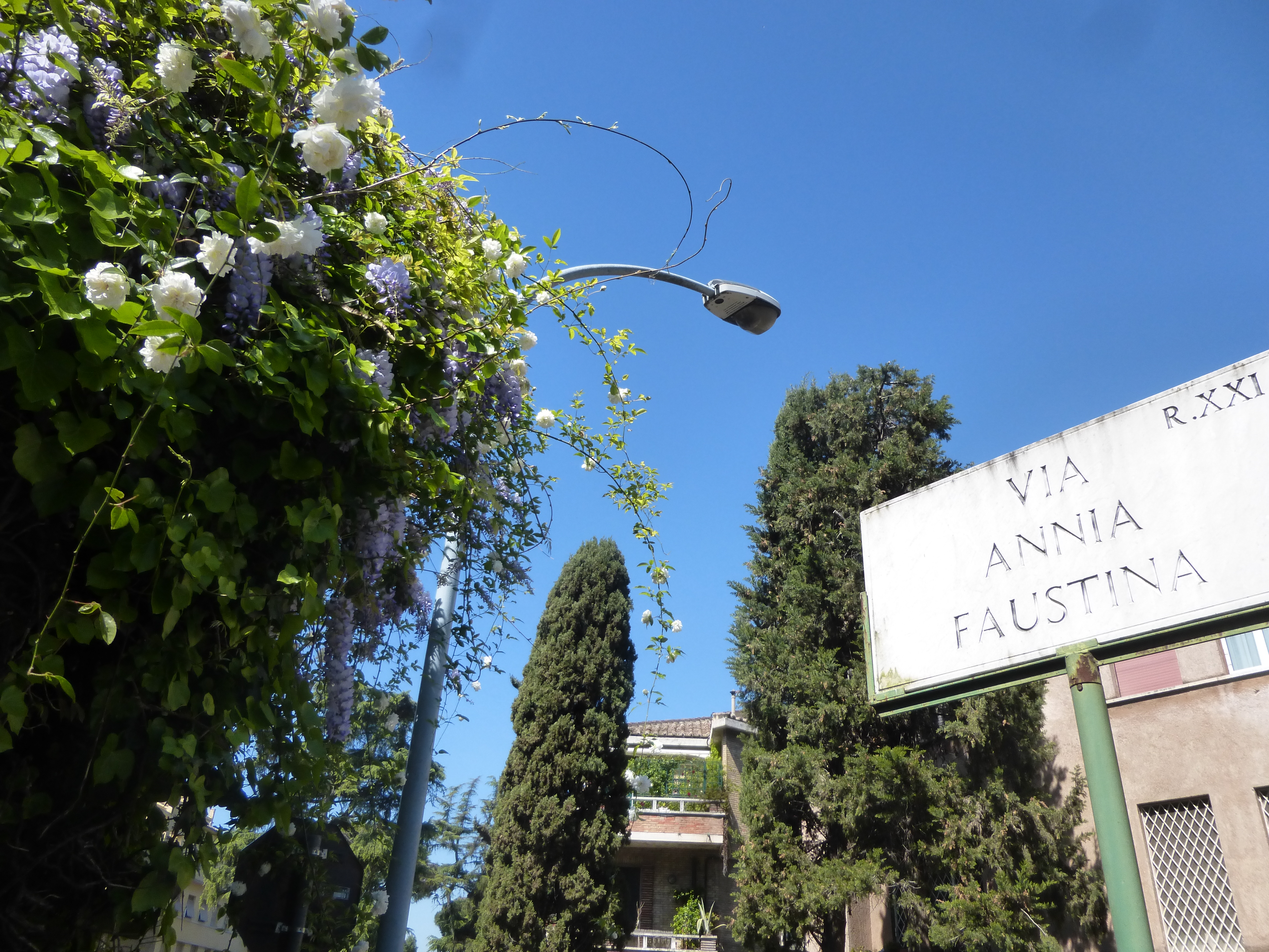 Roma, via Annia Faustina, primavera